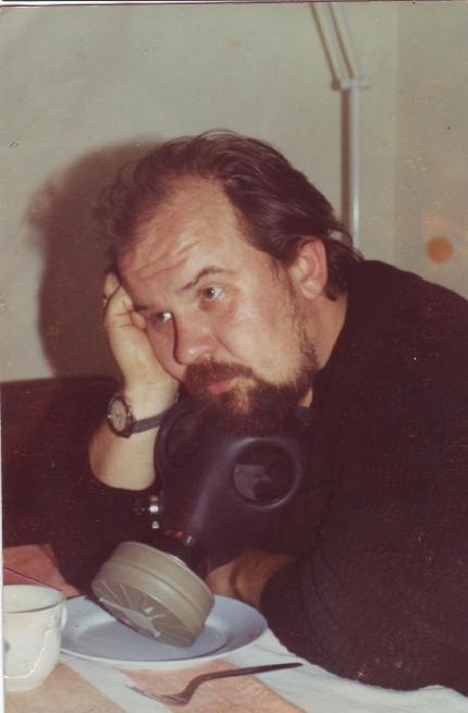 במאי התיאטרון סלבה מלצב